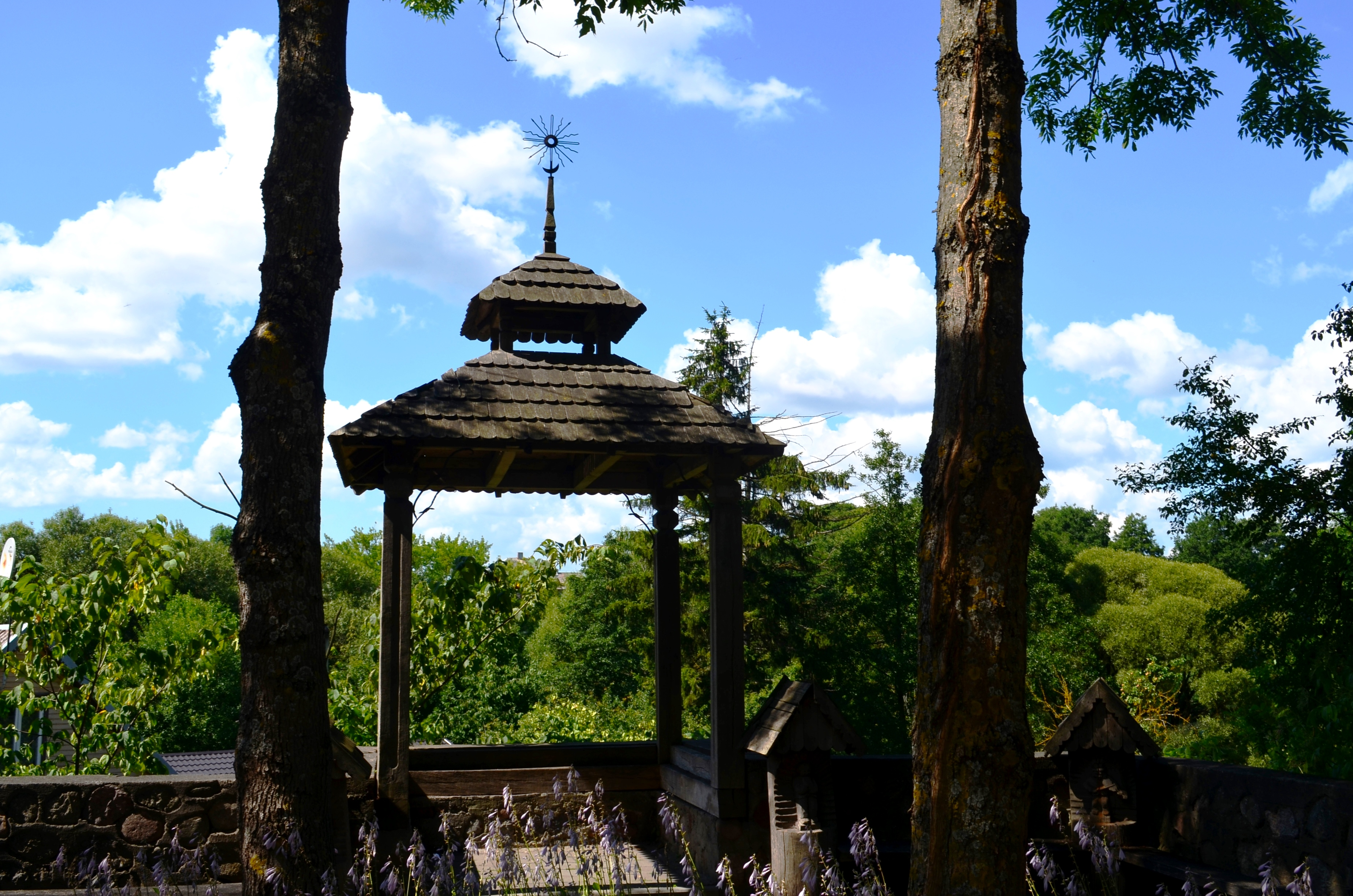 Kretingos medinė koplytėlė